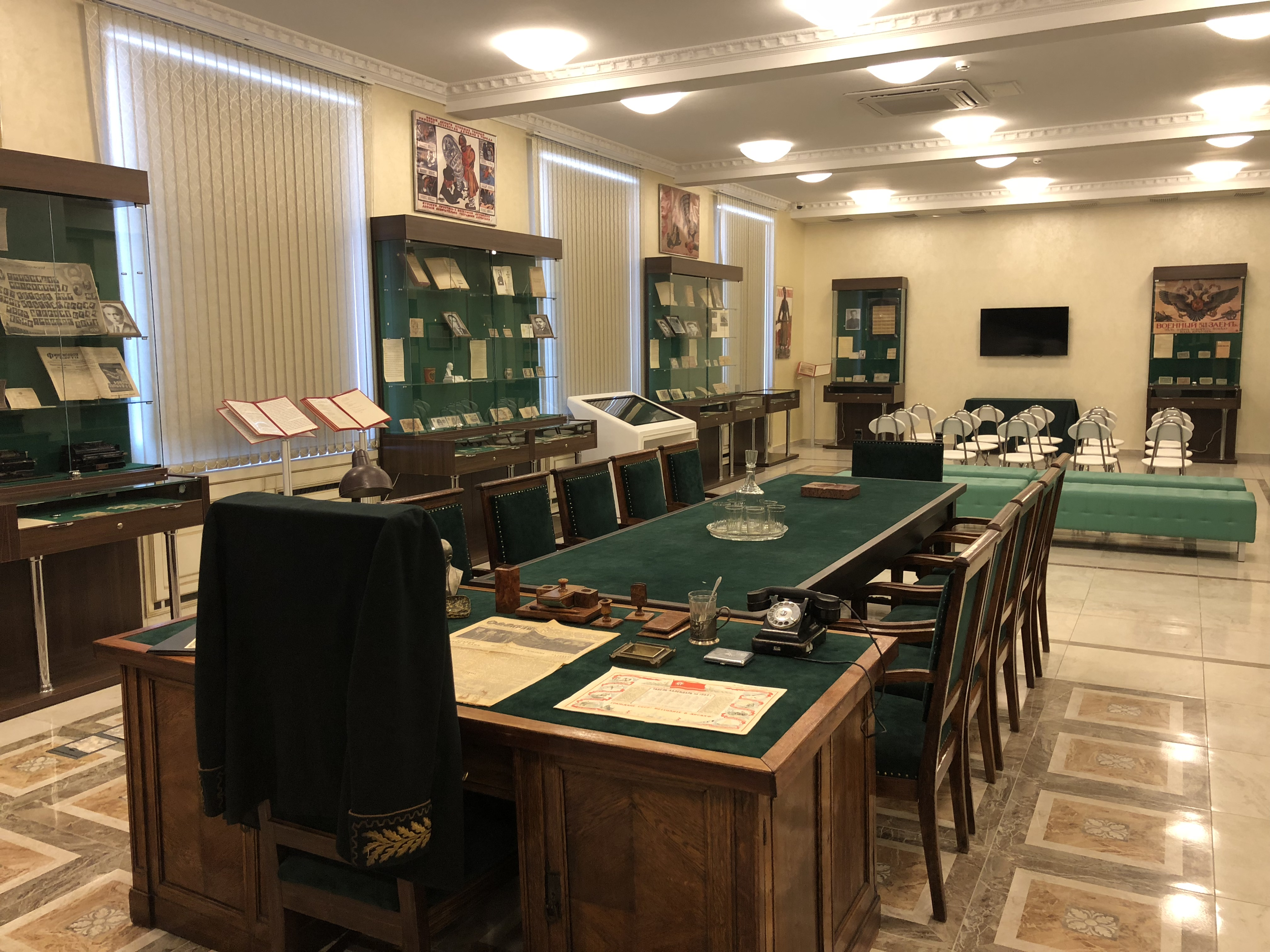 Обновленный Музей финансов